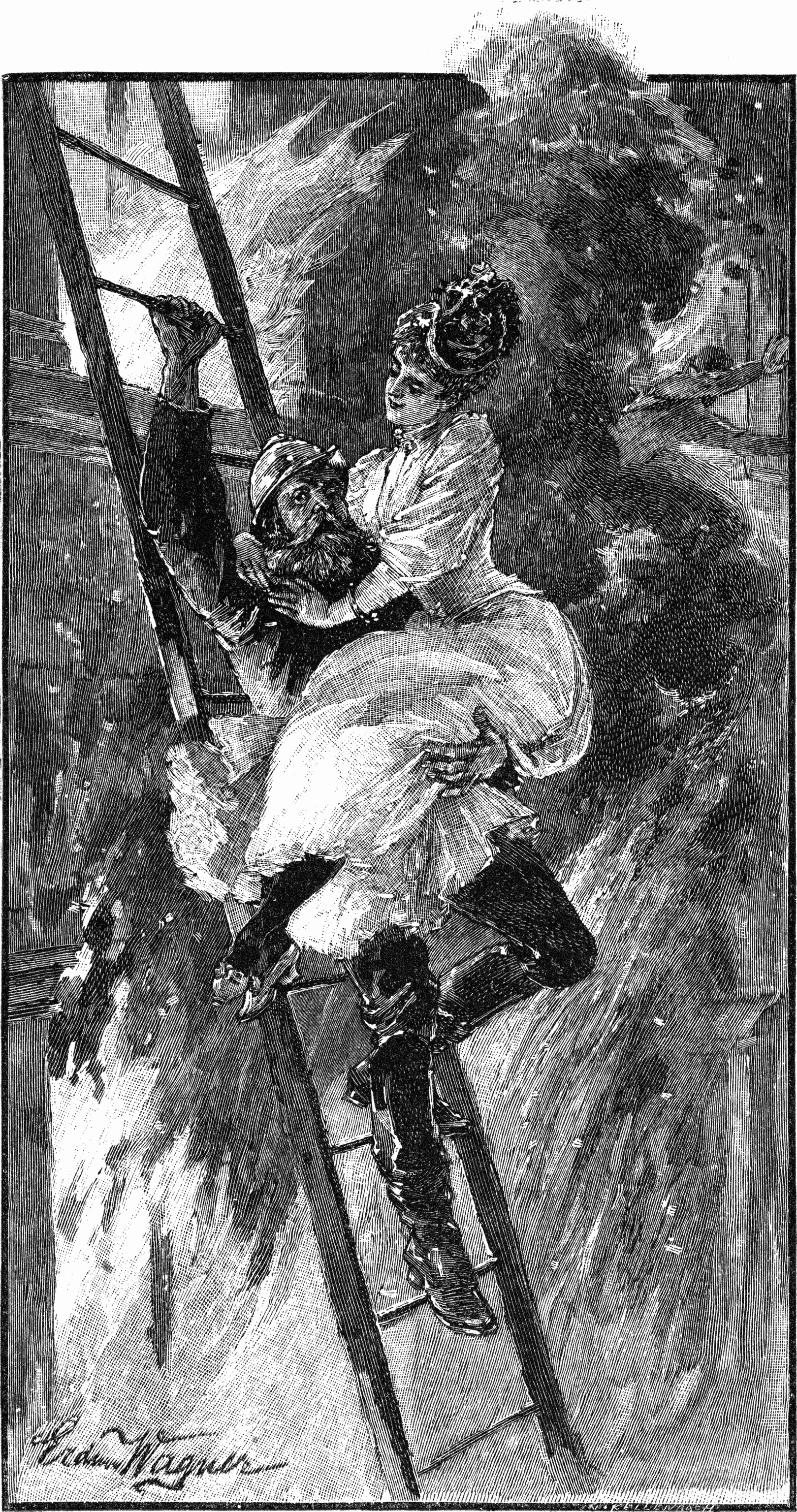 Höchfte Fitelkeit. ,,Ach, bitte, sitzt mein Hut gut?""